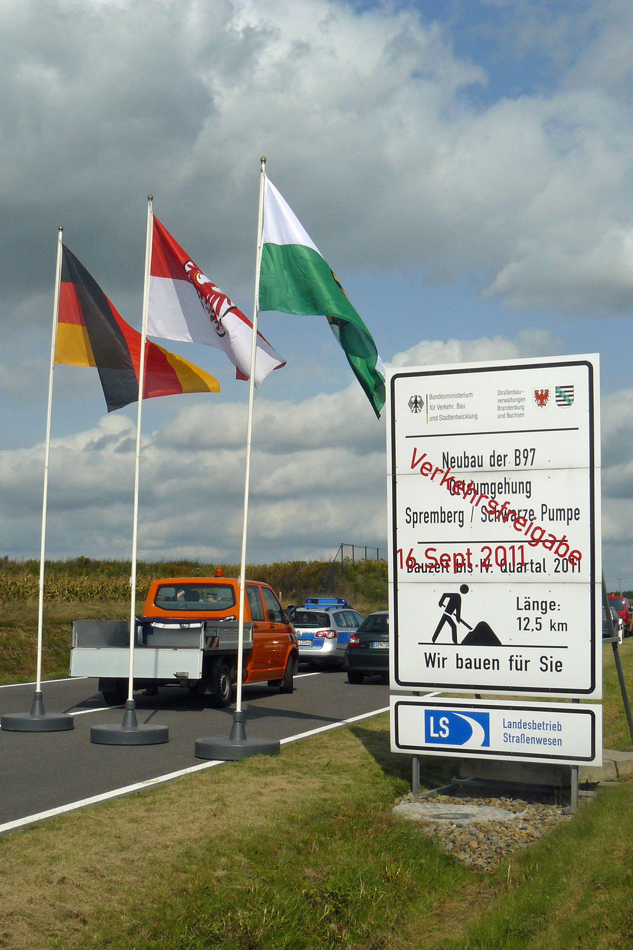 Freigabe der Umgehungsstraße B 97n Spremberg, Schwarze Pumpe am 16. September 2011